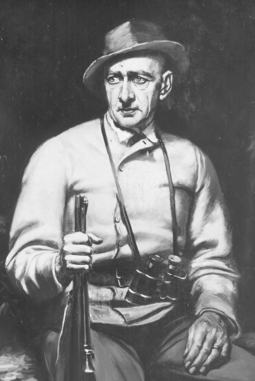 Ernest Habicht